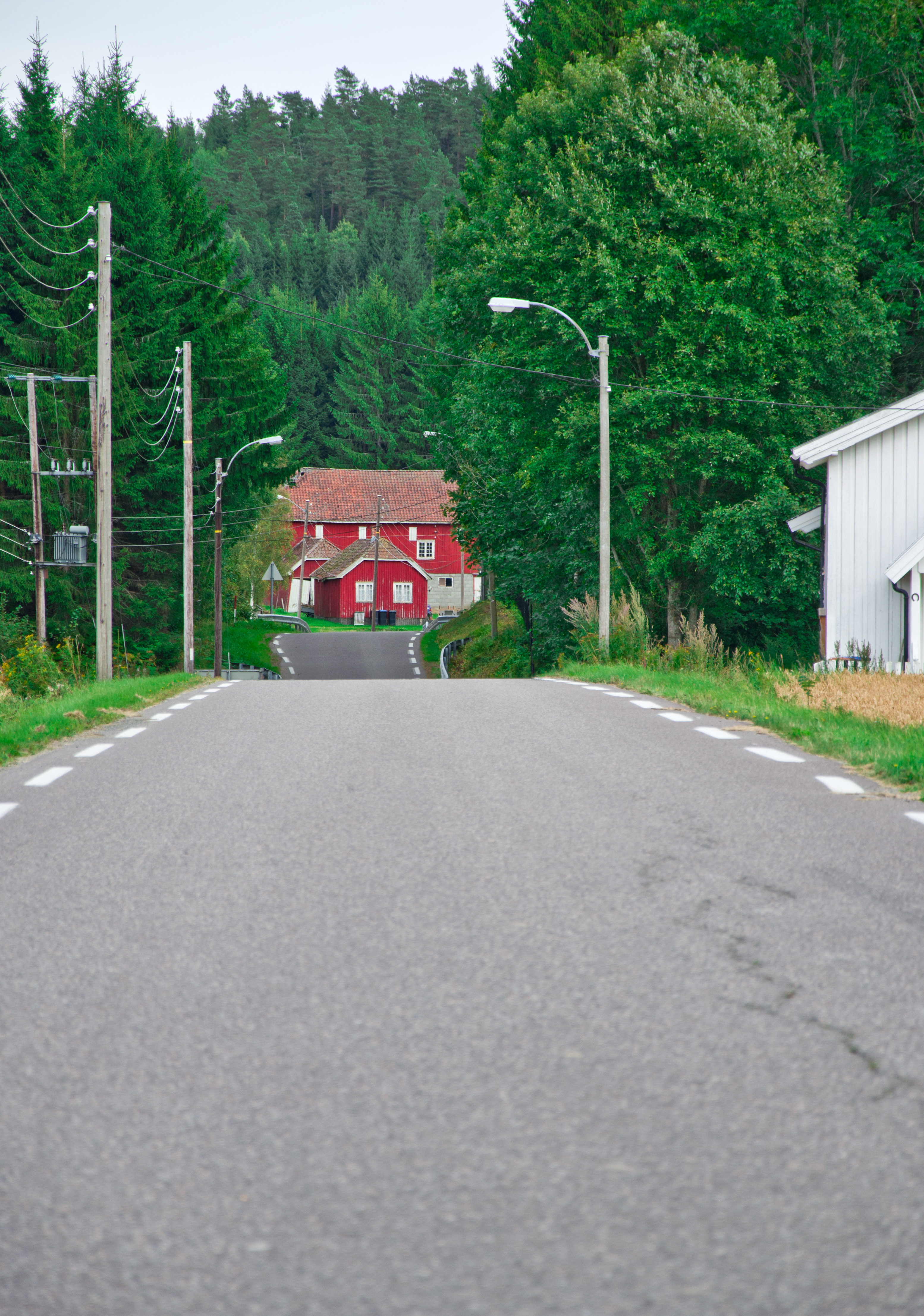 Fylkesvei 204 Ringdalveien i Vestfold, Norge